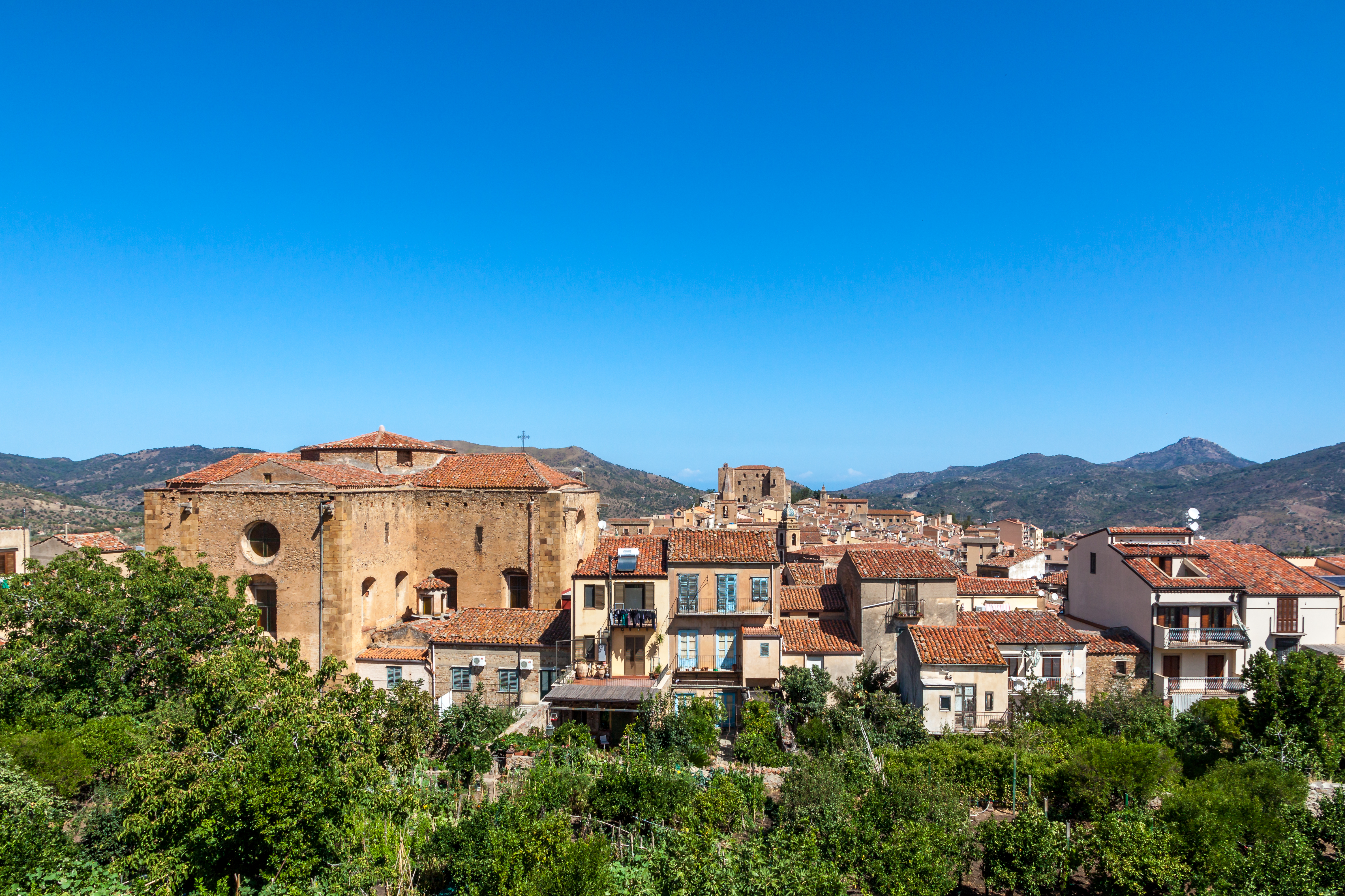 Castelbuono